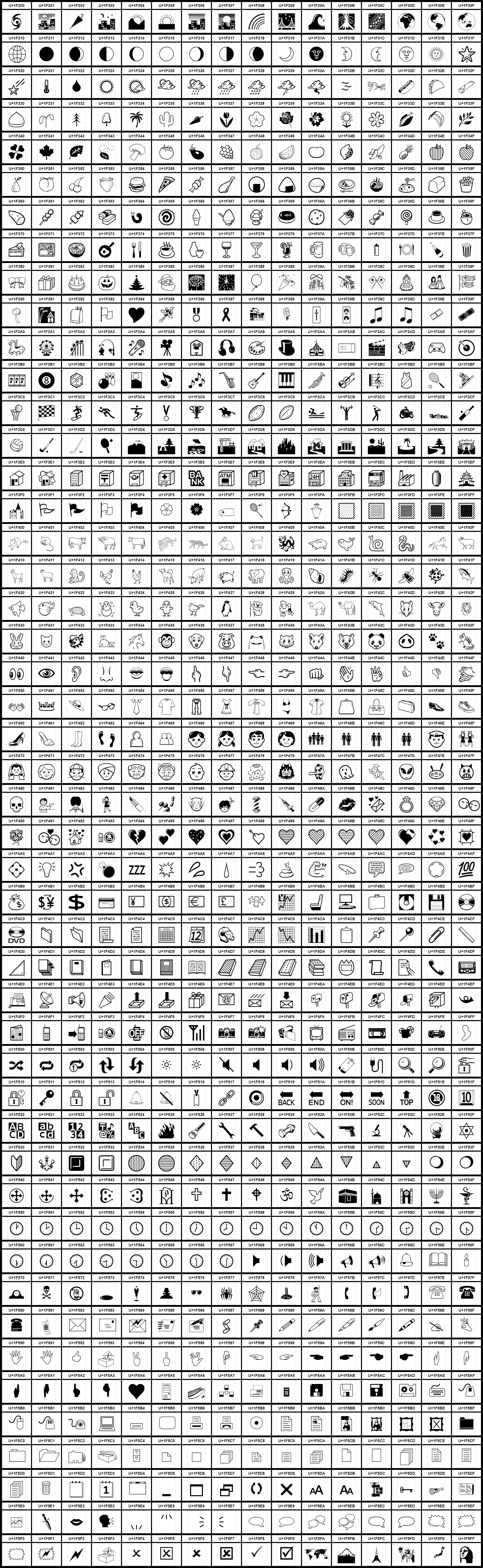 Grafiktafel für den Unicodeblock Verschiedene piktografische Symbole. Schraffierte Felder sind unbesetzte Codepoints.